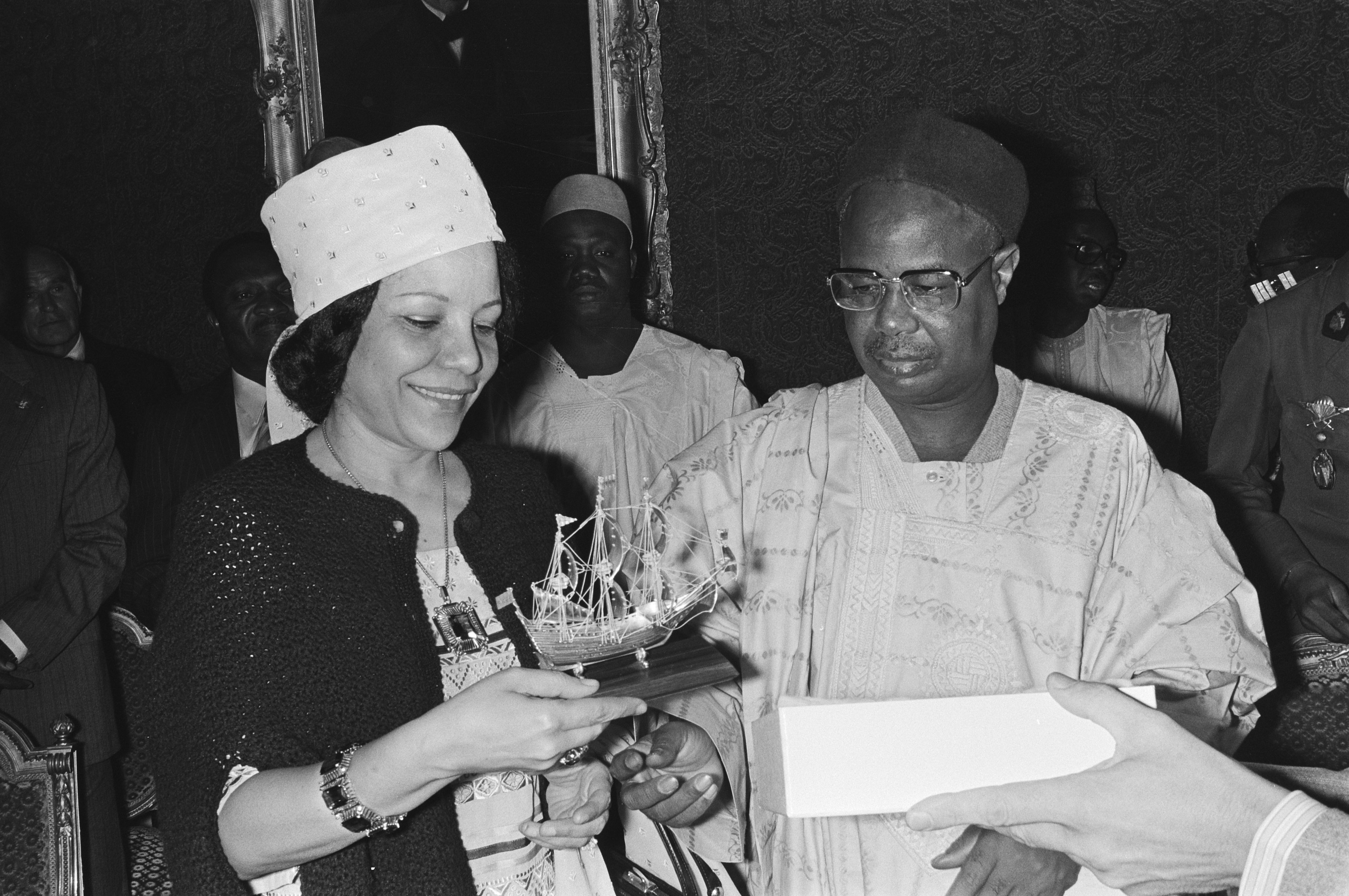 Staatsbezoek van president Ahmadu Ahidjo van Kameroen aan Nederland. Bezoek aan de ambtswoning van de burgemeester van Amsterdam; Ahmadu Ahidjo en zijn echtgenote Germaine bekijken een door loco-burgemeester Sinnighe aangeboden scheepje